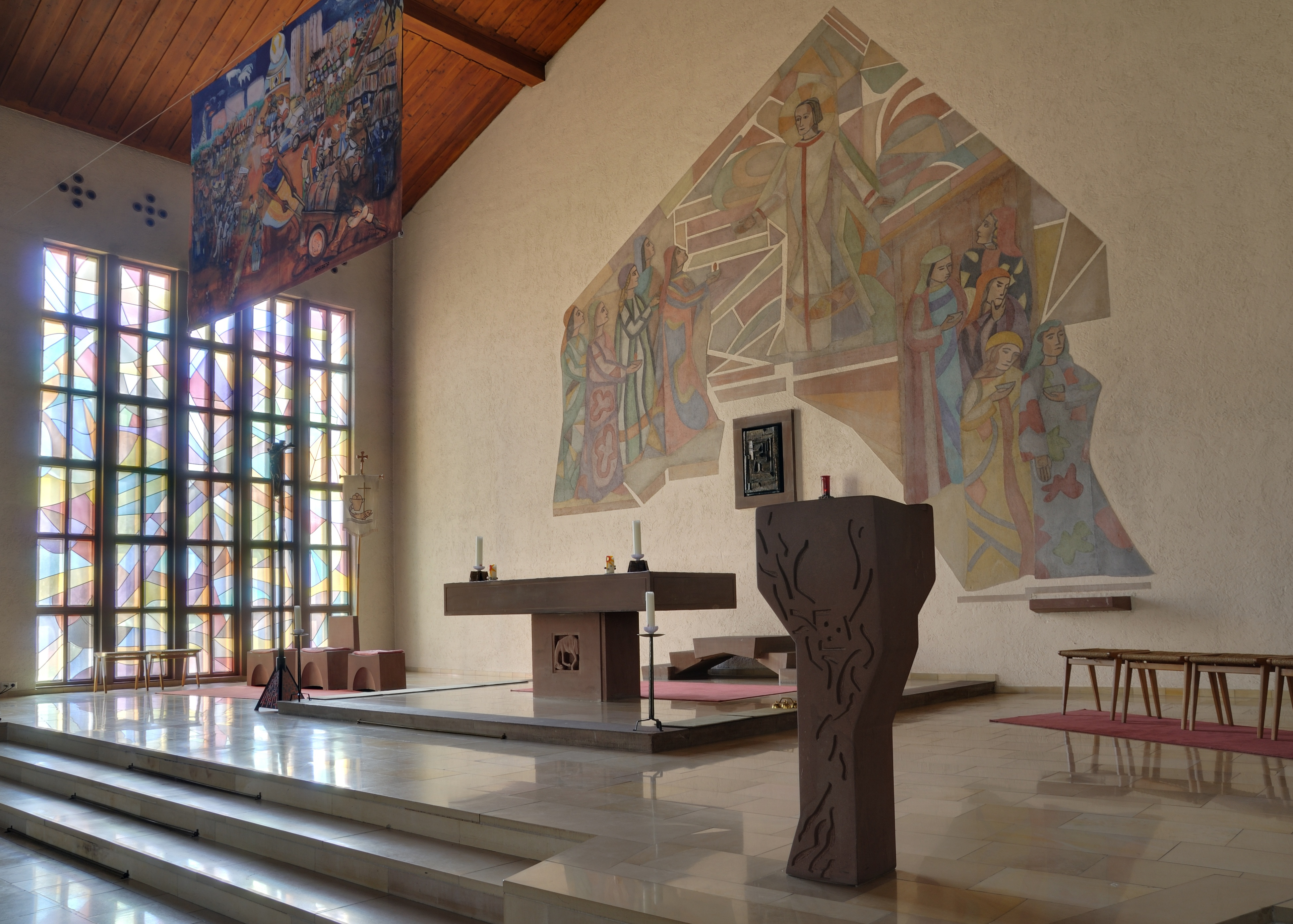 Grenzach: Michaelskirche, Altar